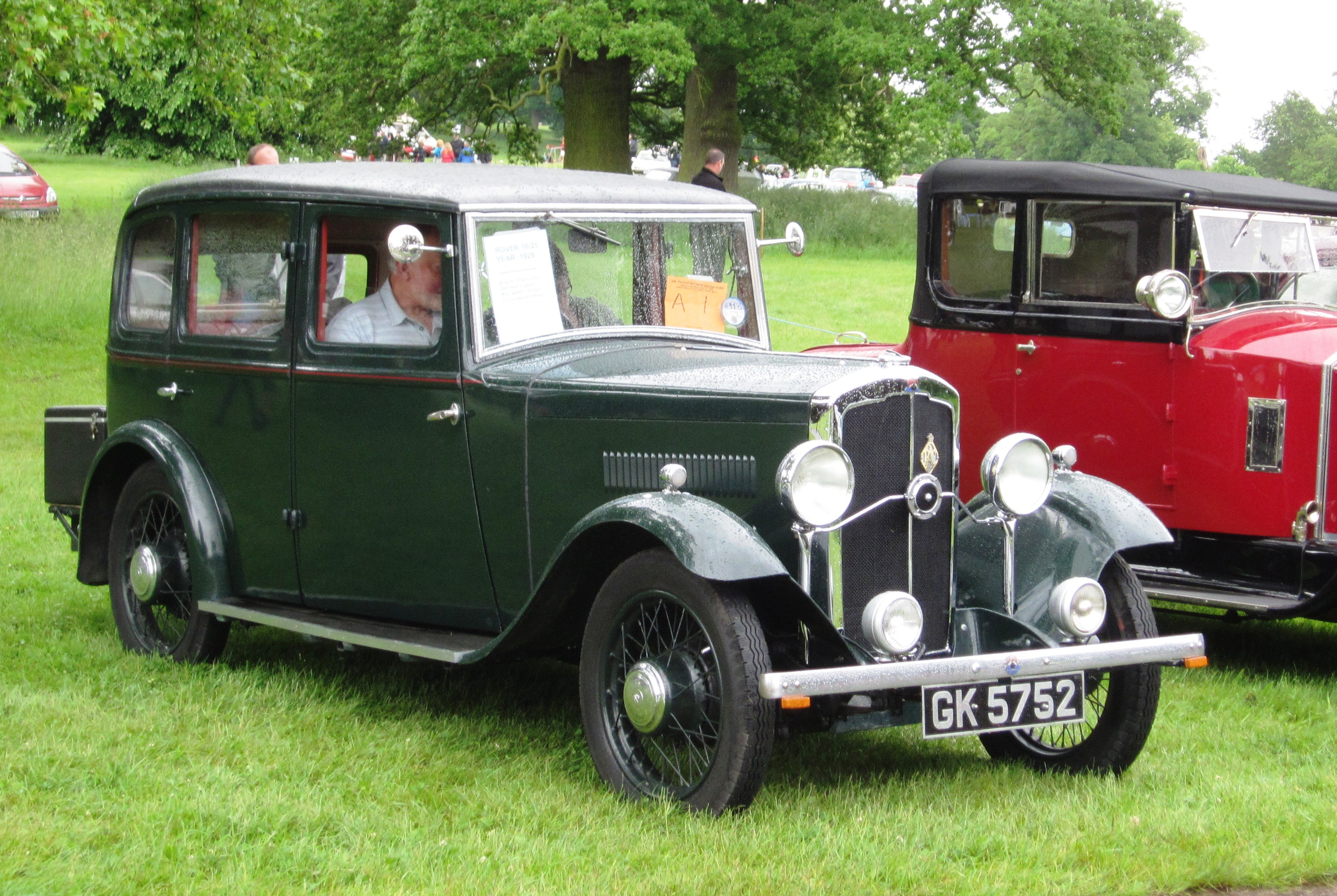 Rover 10/25 (1929)